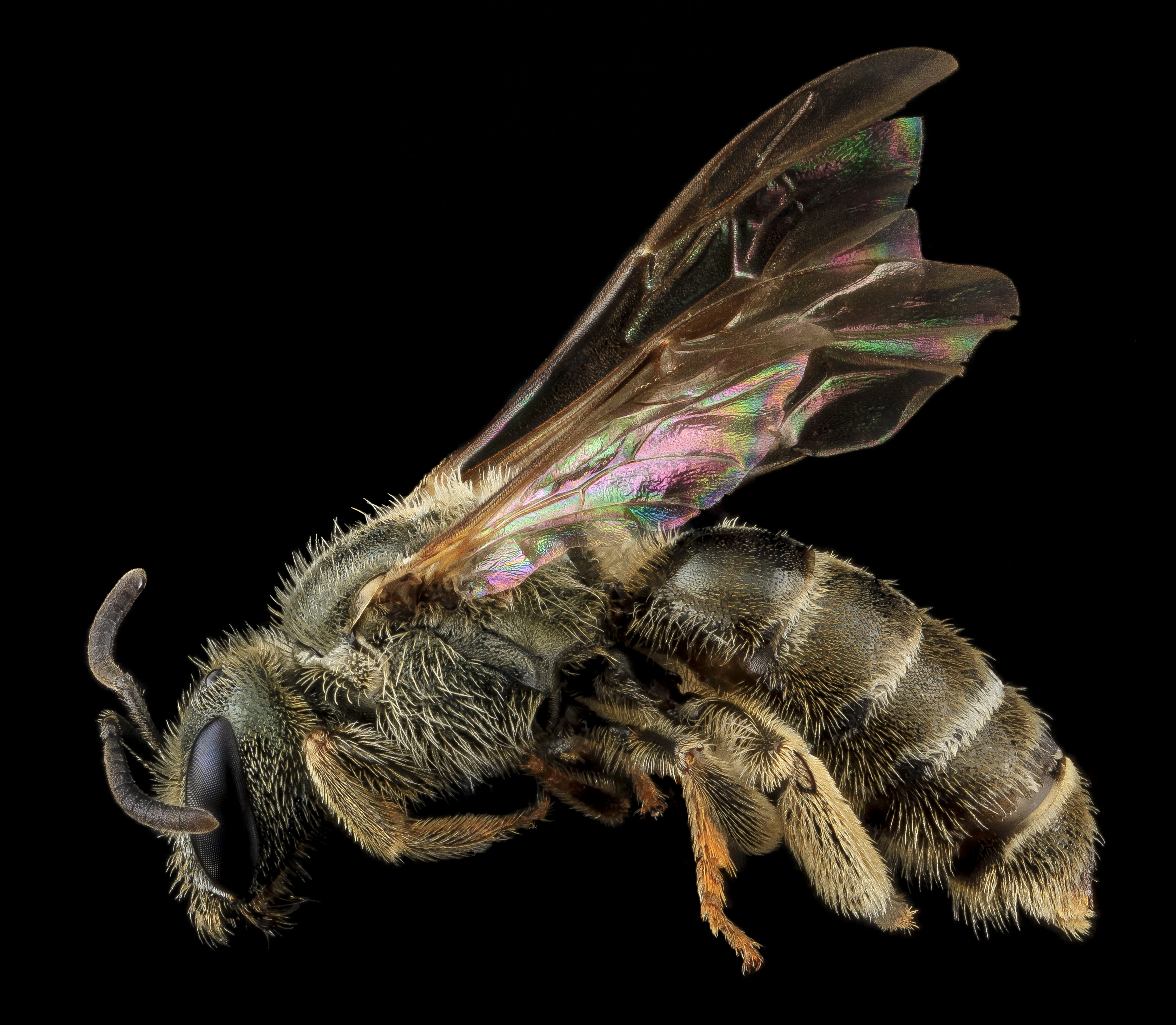 Halictus confusus, female.